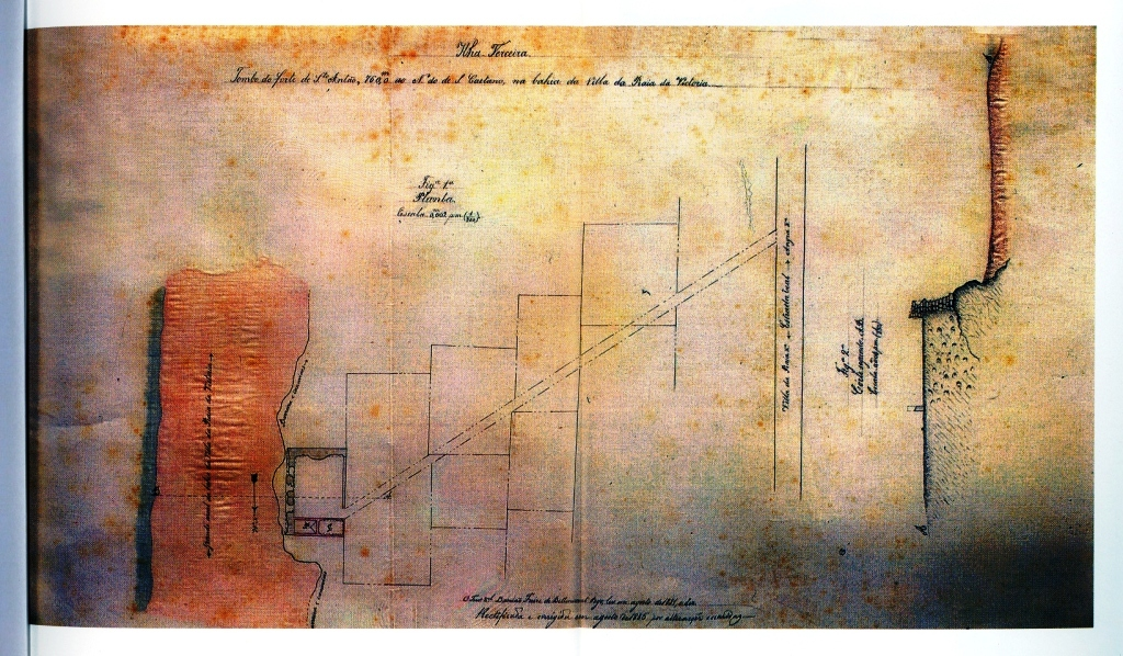 "Tombo do forte de St. Antão...", Ilha Terceira (Açores), Portugal.